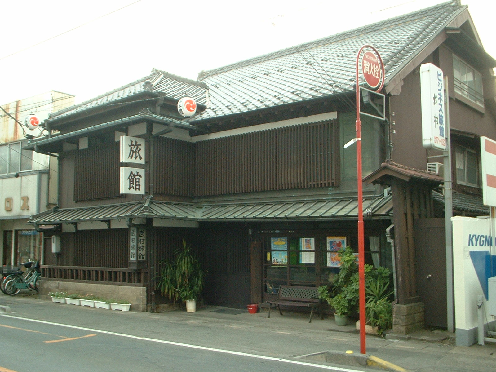 もとは桶川宿の旅籠の一つ。現在でも営業していて、国の登録有形文化財として登録されている。